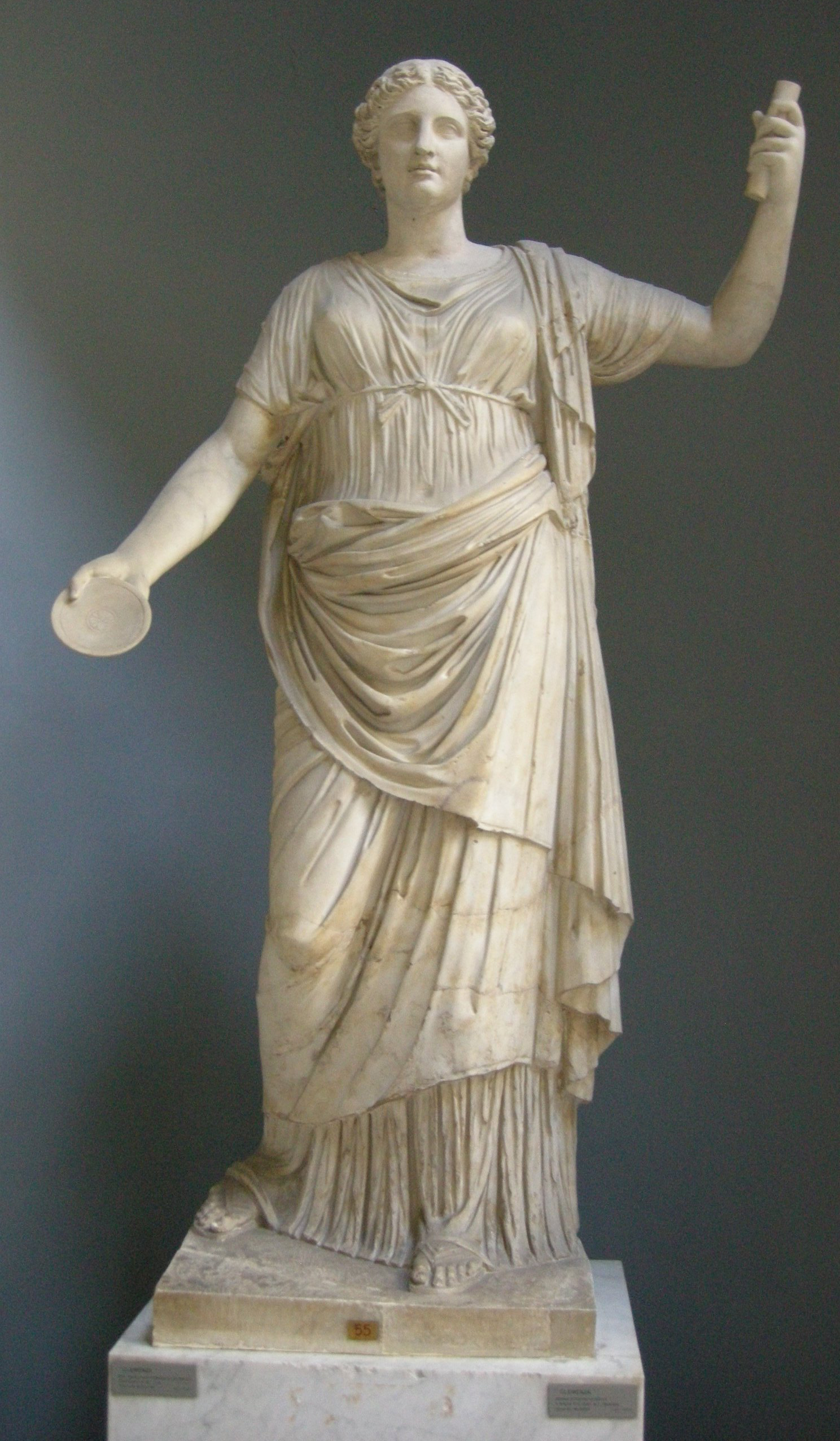 Clemenza, rielaborazione romana da originale greco del IV secolo ac., testa di reaturo, inv. 2260